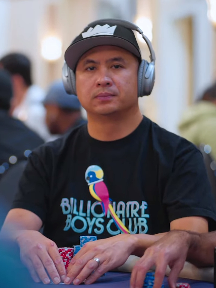 J. C. Tran beim WPT Legends of Poker